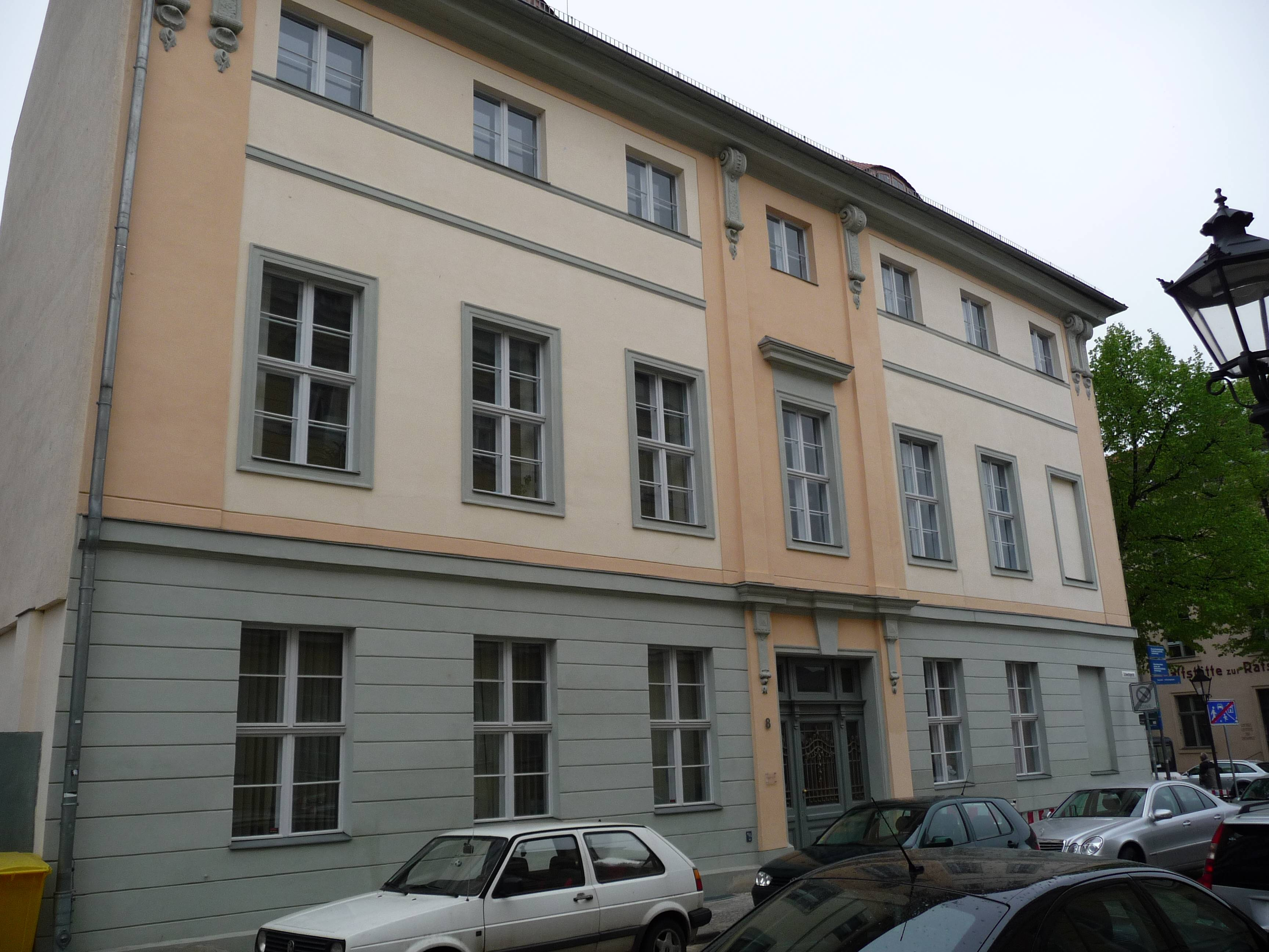 Neuen Markt, Schwertfegergasse 8 in Potsdam, Deutschland